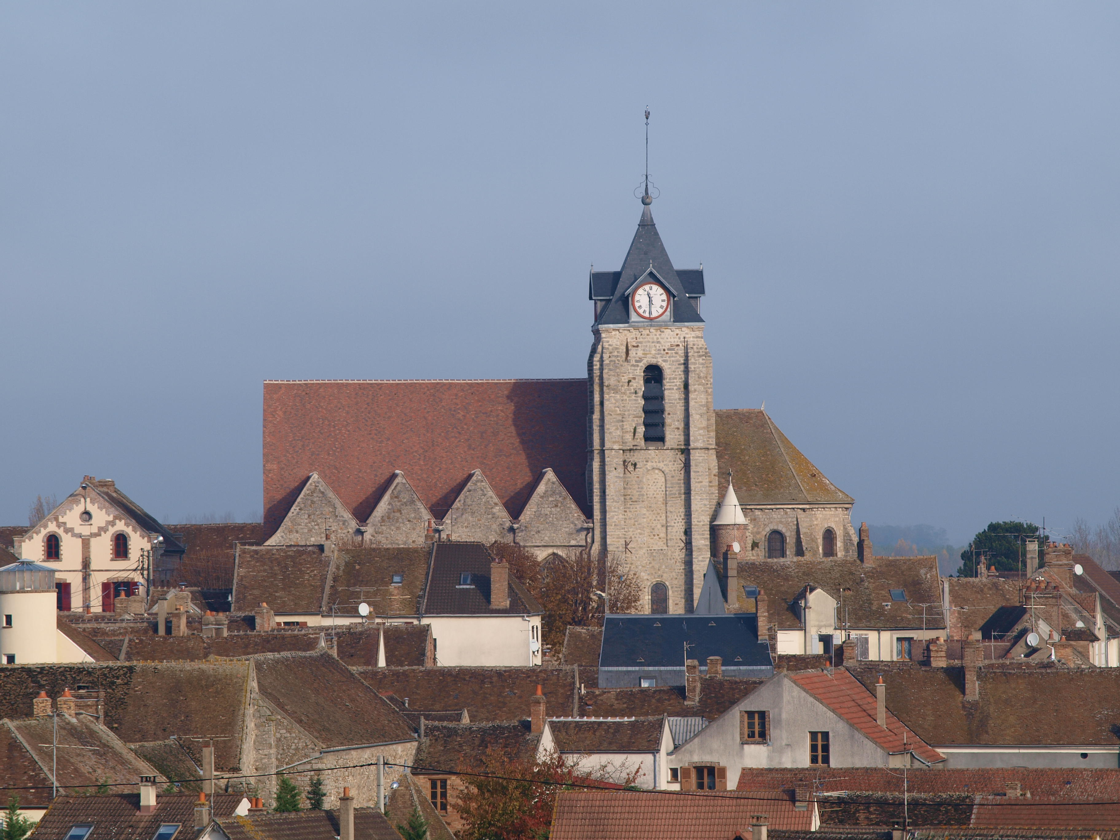 Villeneuve-la-Guyard (Yonne, France) ; Église Saint-Germain.